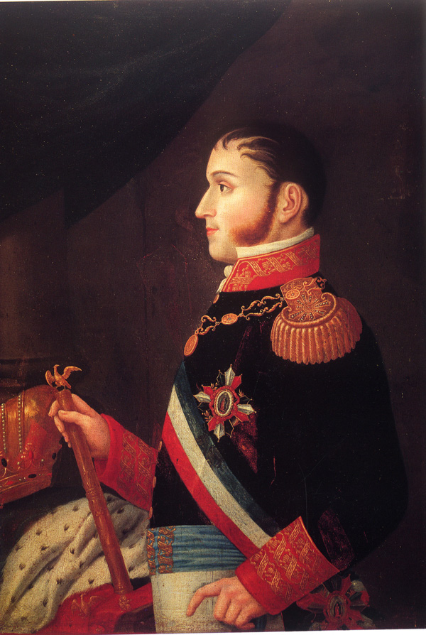 Half-length portrait of Agustín de Iturbide, Emperor of Mexico.label QS:Len,"Half-length portrait of Agustín de Iturbide, Emperor of Mexico."label QS:Les,"Retrato de medio cuerpo de Agustín de Iturbide, Emperador de México."